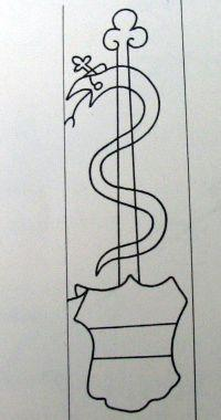 Znak wodny B z De revolutionibus Mikołaja Kopernika